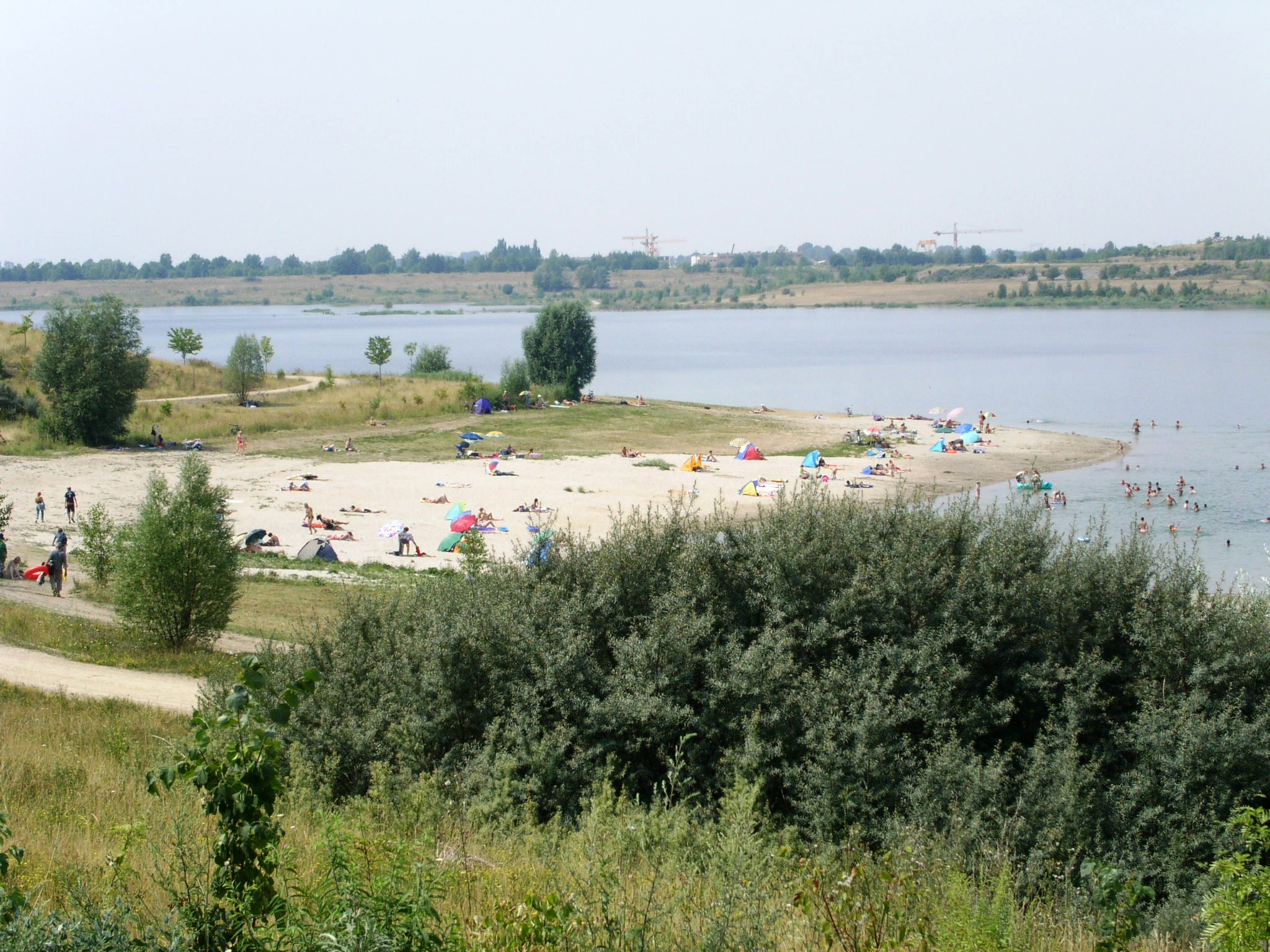 Schladitzer Bucht am Schladitzer See